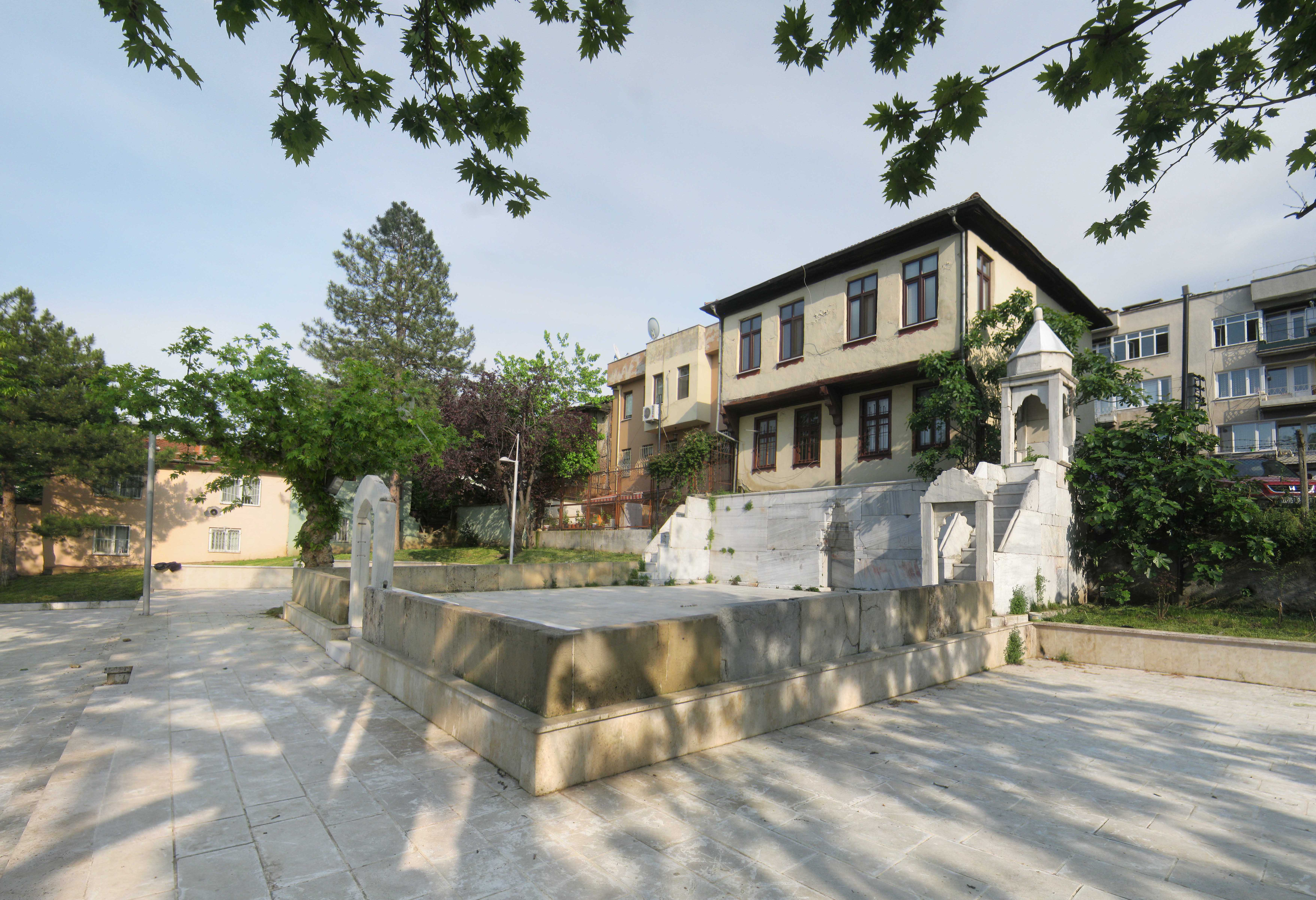 NAMAZGAH KUBBESİZ AÇIK CAMİ BURSA